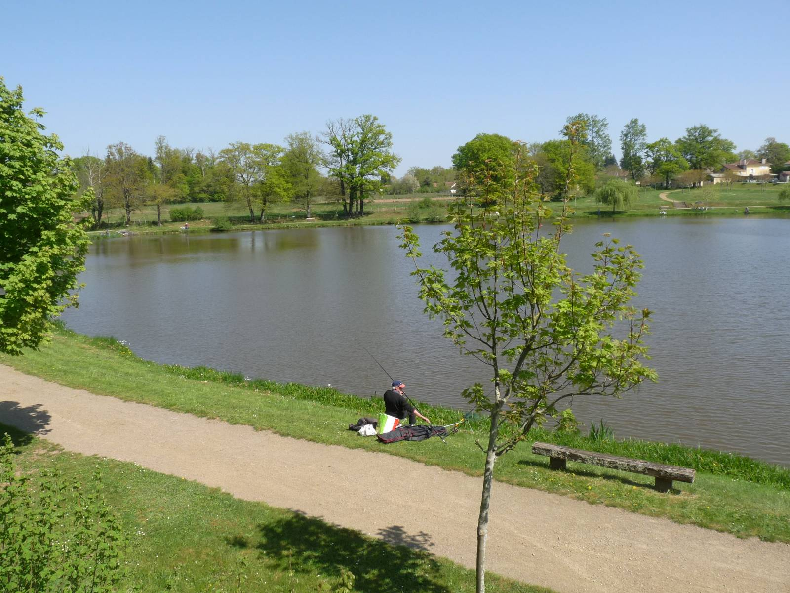 étang de Montrollet un dimanche, Charente, France